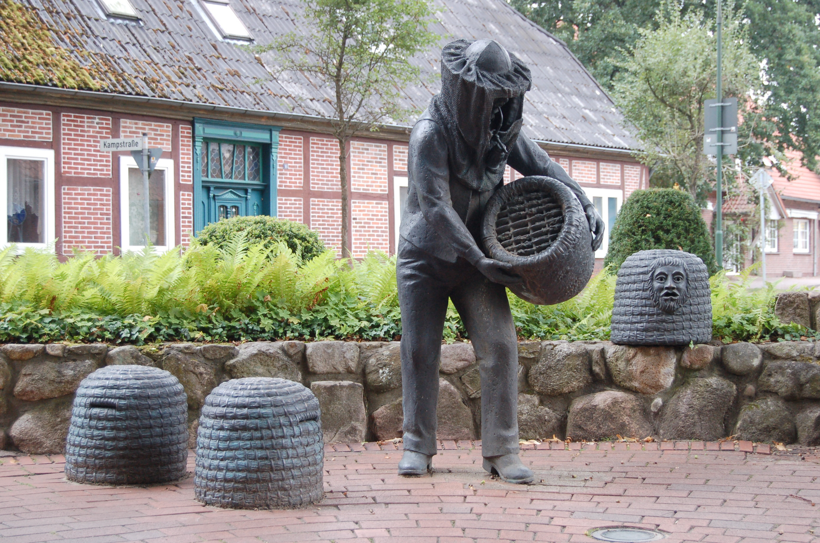 Der Wietzendorfer Imker, Figurengruppe aus Bronze, auf dem Kirchenvorplatz in Wietzendorf in Niedersachsen, Deutschland. Das Denkmal wurde 1996 von dem deutschen Bildhauer Claus Homfeld zur Erinnerung an den dort verbreiteten Berufsstand des Imkers und als Wahrzeichen des alljährlichen „Honigfestes“ geschaffen. Rechts, auf der Mauer stehend ist ein Bannkorb dargestellt.